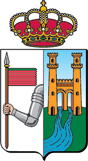 Escudo usado actualmente por el Ayuntamiento de Zamora